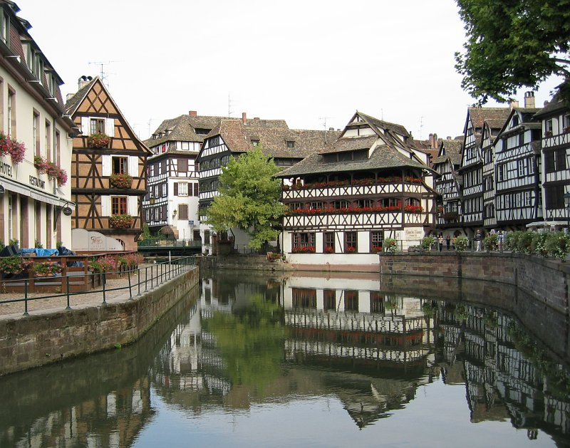 «La Petite France» in Straßburg.